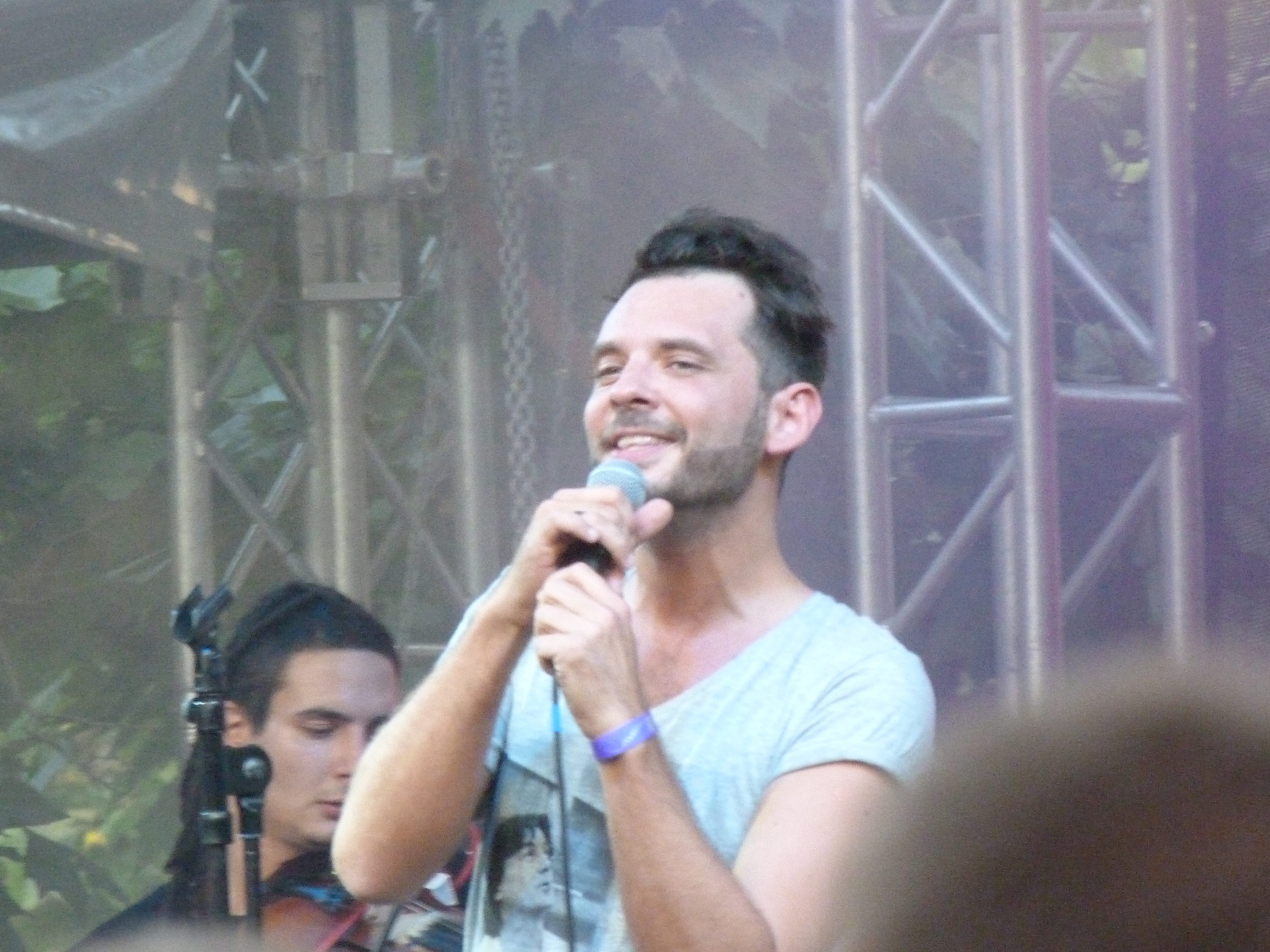 A felvétel 2013. Június 9 –én készült Budapesten, a Szabadság téren. Belvárosi Fesztivál. A Punnany Massif hip-hop zenekar. Négy lemezük jelent meg: 2006-ban a Körkorkép, 2010-ben a ShenKick, 2011-ben a SunKick, illetve 2013-ban a Fel#1. ©© Megjelent Creative Commons alatt a Metapolisz sorozatban. A Metapolisz sorozat valamennyi képe és filmje Creative Commons alatti valamint kereskedelmi - for profit - célra is felhasználható. Ajánlott hivatkozás: Derzsi Elekes Andor: Metapolisz DVD line ©© Published under Creative Commons in the Metapolisz DVD line. All of the photos and vids in the Metapolisz DVD line are under Creative Commons and can be used even for commercial – for profit – purposes. Recommended Citation Derzsi Elekes Andor: Metapolisz DVD line